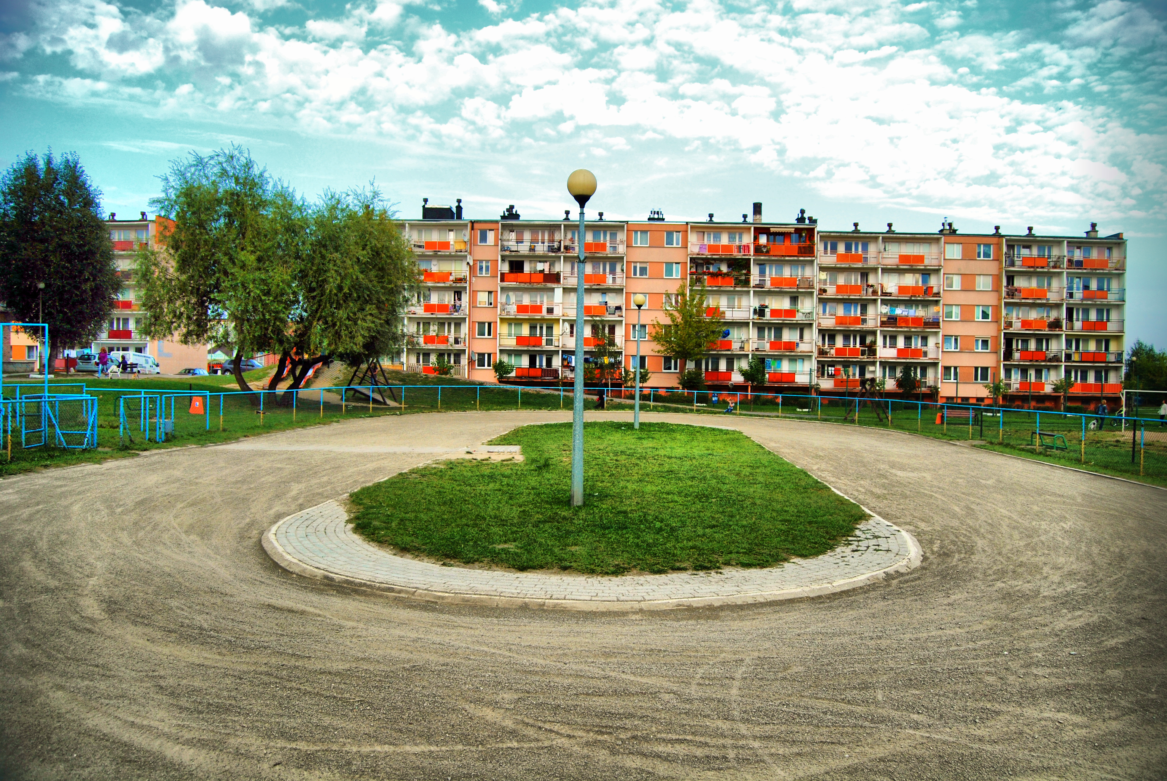 Gniezno - tor speedrowerowy